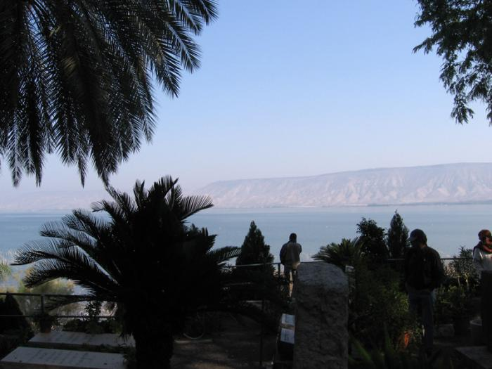 תצפית את הכינרת מכיוון בית הקברות